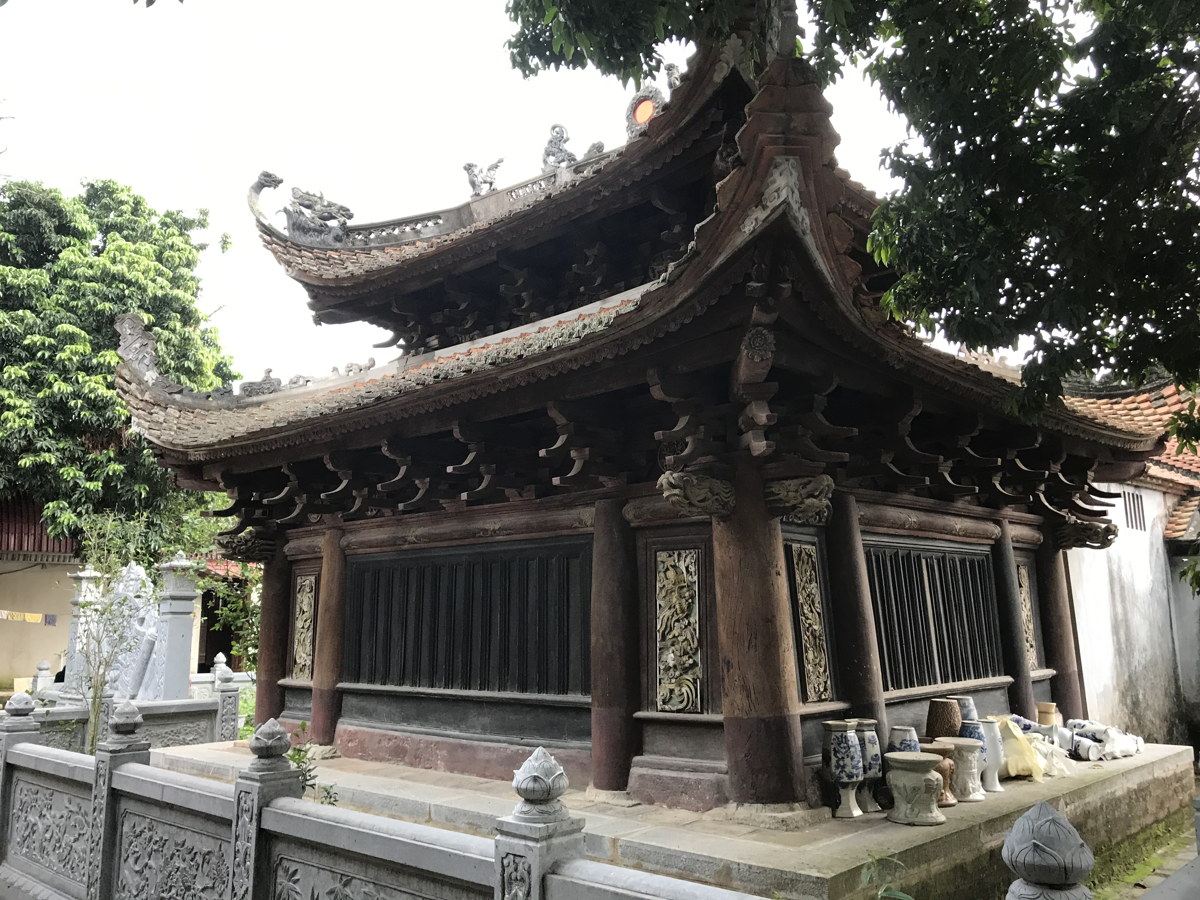 Hậu cung chùa Bối Khê